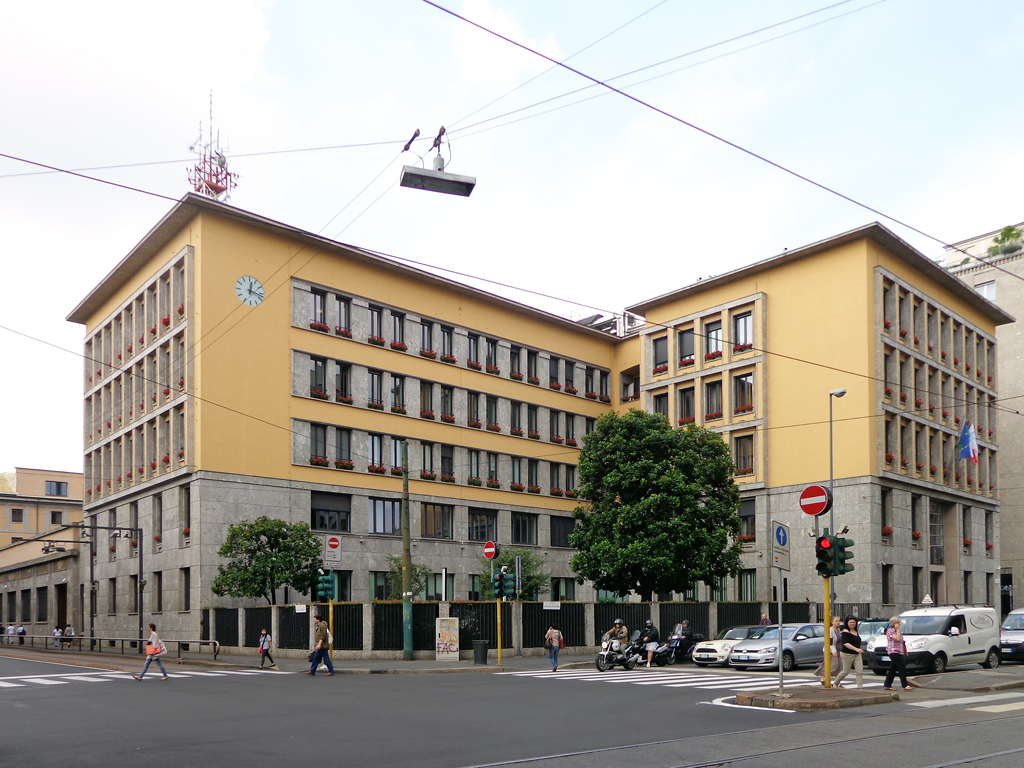 Milano, la sede dell'Azienda Energetica Municipale (AEM) vista dall'angolo fra corso di Porta Vittoria e via Visconti di Modrone.